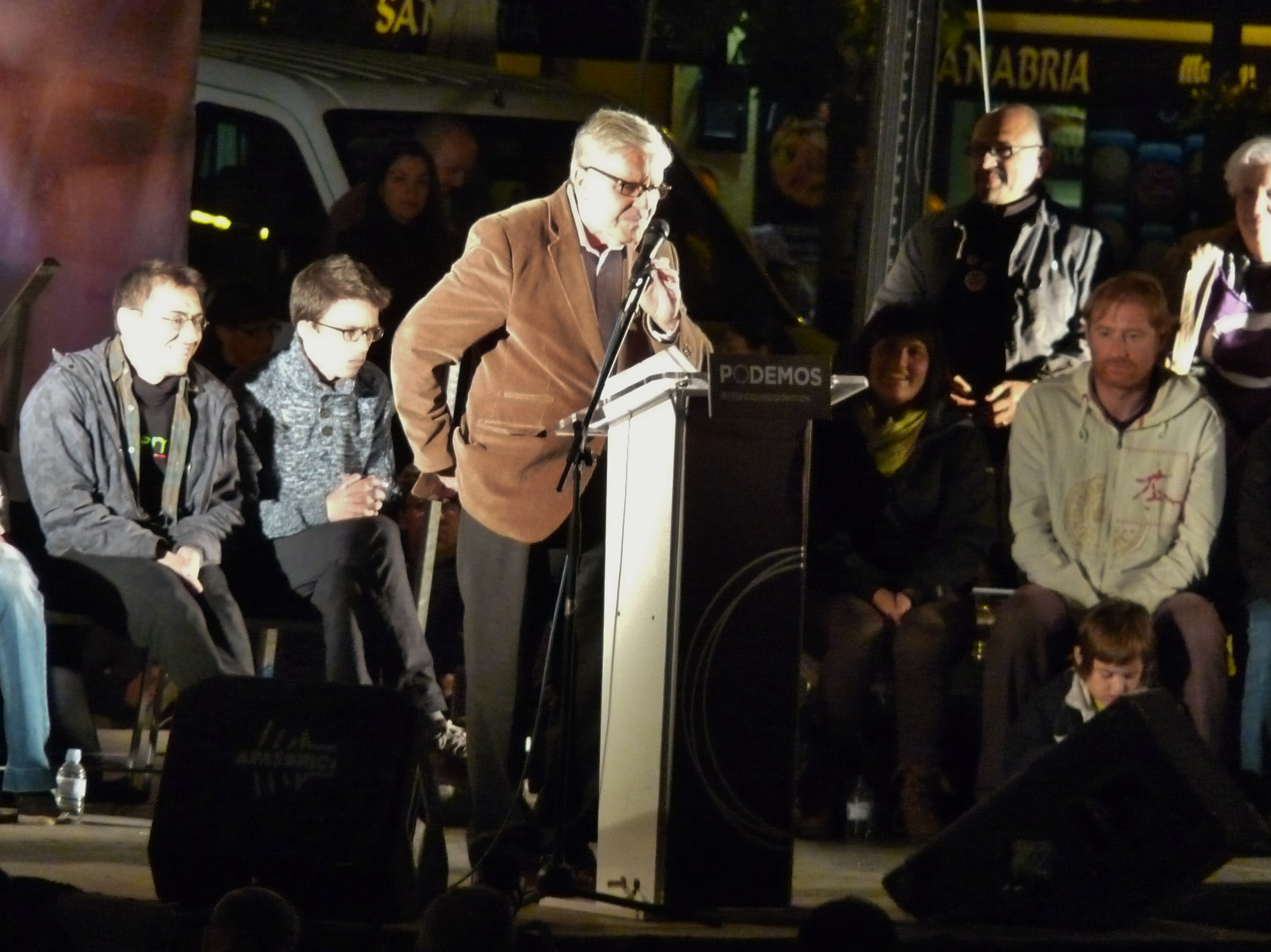 Carlos Jiménez Villarejo en el mitín de fin de campaña de las elecciones europeas de 2014 celebrado el 23 de mayo en Madrid.